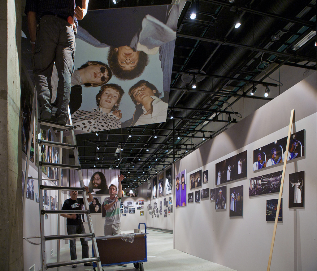 Robert Meyers portrett av The Pussycats blir montert på åpningsutstillingen Icons of the 60's på Rockheim